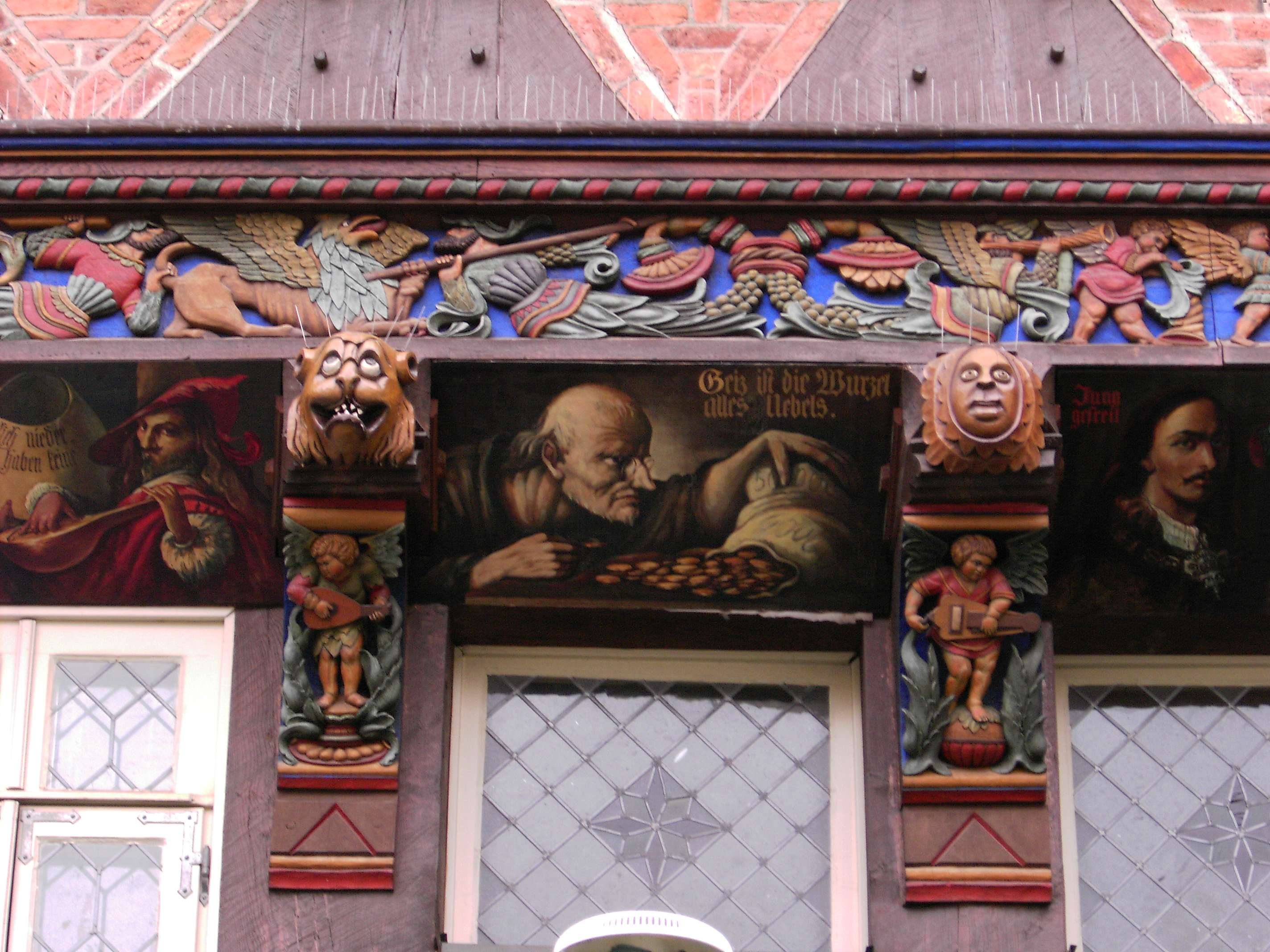 Hildesheim, Knochenhaueramtshaus, Front, Detail